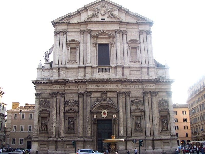 Roma - Chiesa di S. Andrea della Valle